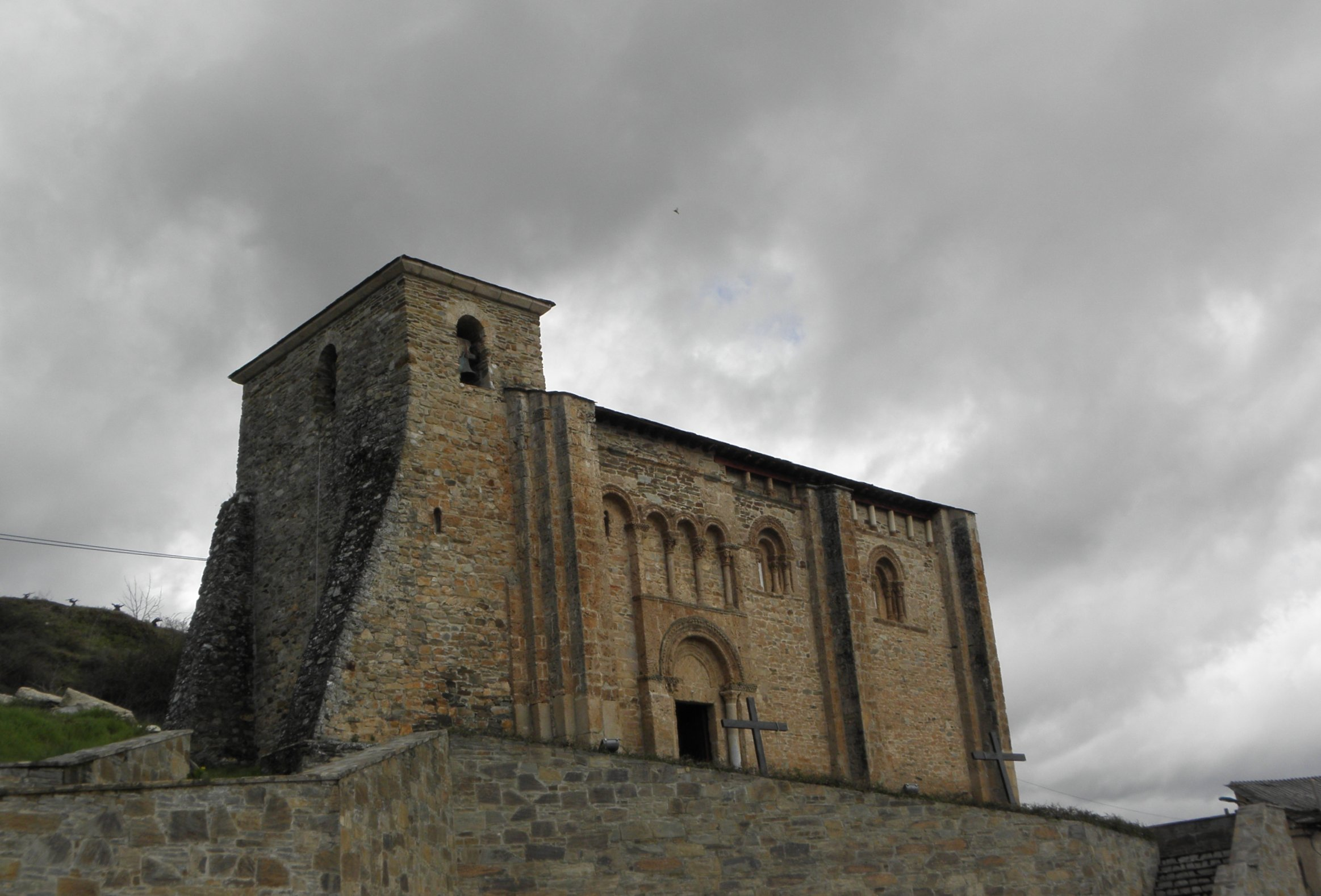 Iglesia de San Miguel de Corullón